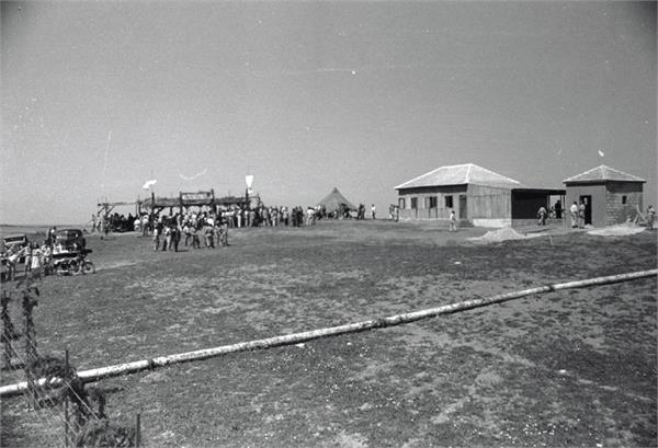 בני ציון - טקס העליה על אדמת "בני ציון" - מראה הצריפים הראשונים ומקום החגיגה